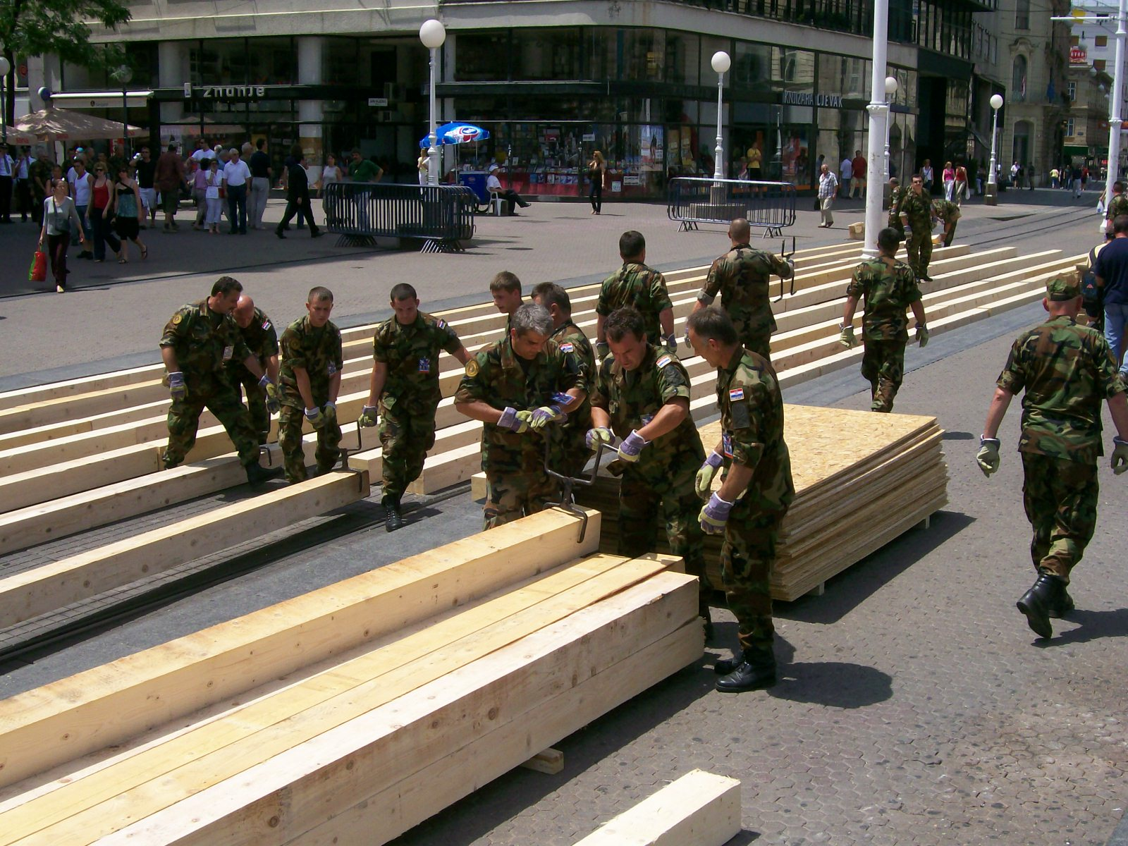 Logistika u OSRH na Trgu bana Jelačića u Zagrebu, 25.6.2008.